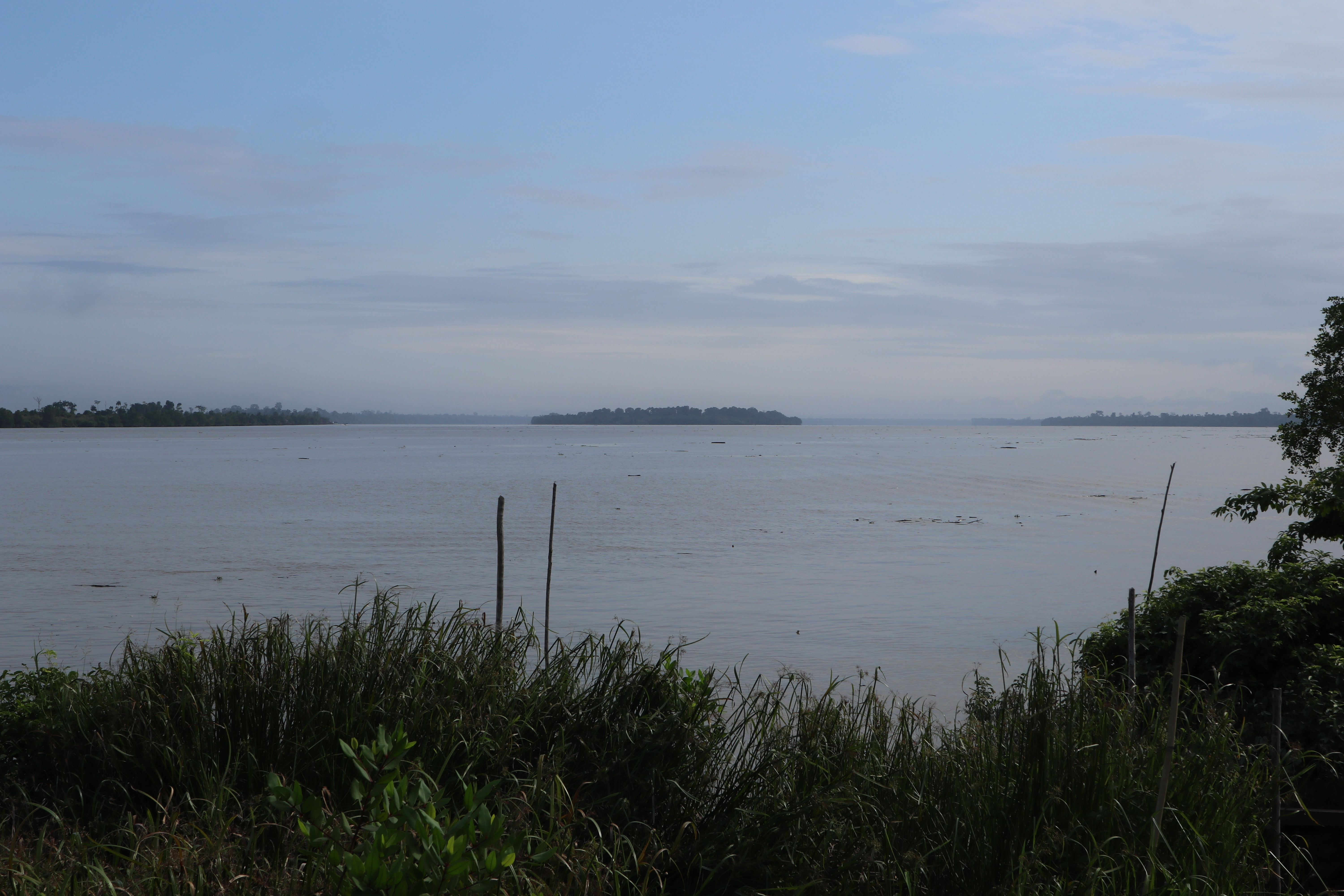 Panorama Sungai Sesayap dan Pulau Sepunti yang berada di tengah-tengah sungai.